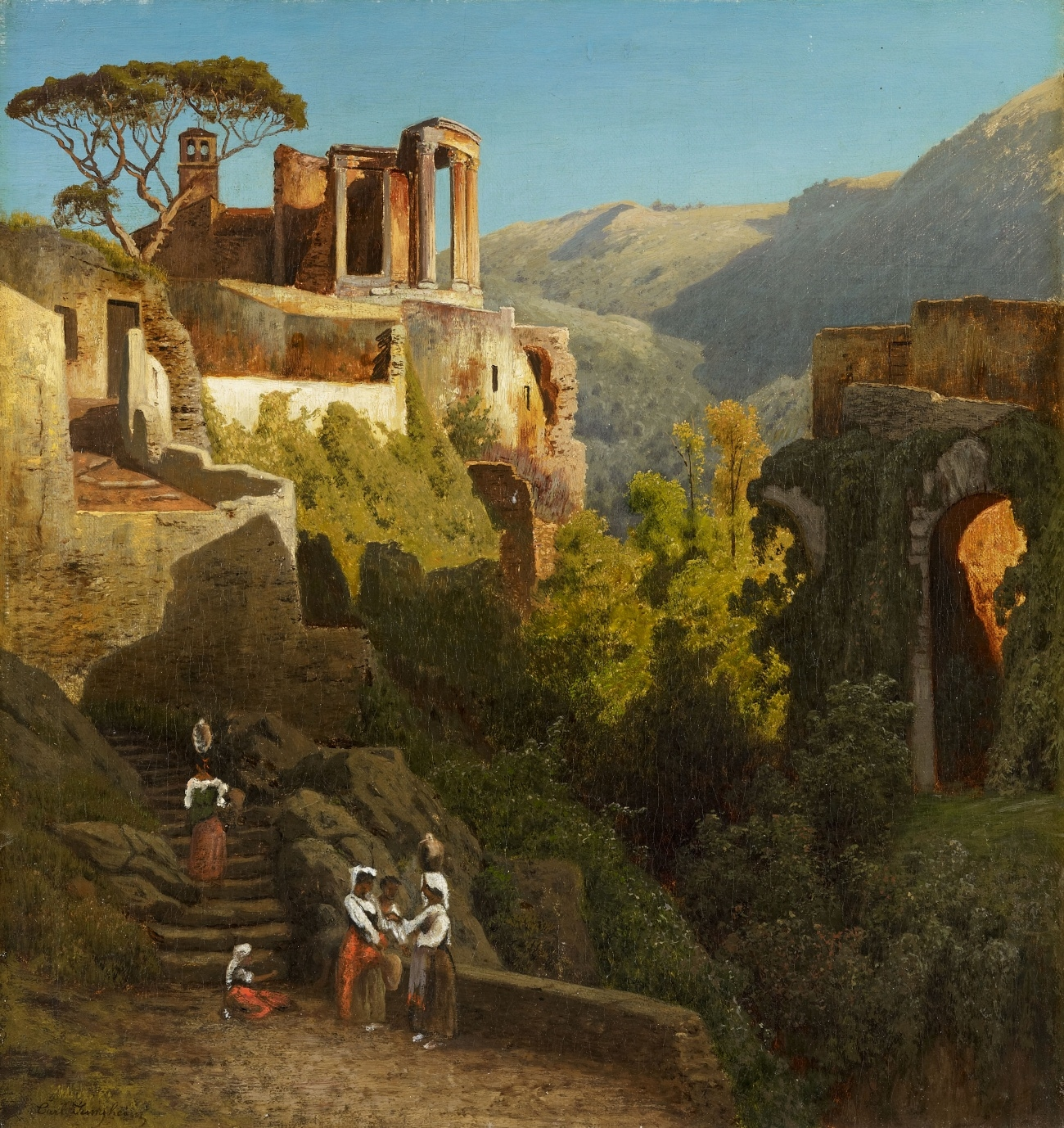 Ansicht des Vesta-Tempels in Tivoli. Signiert unten links: Carl Jungheim. Öl auf Leinwand. 52,5 x 49 cm.